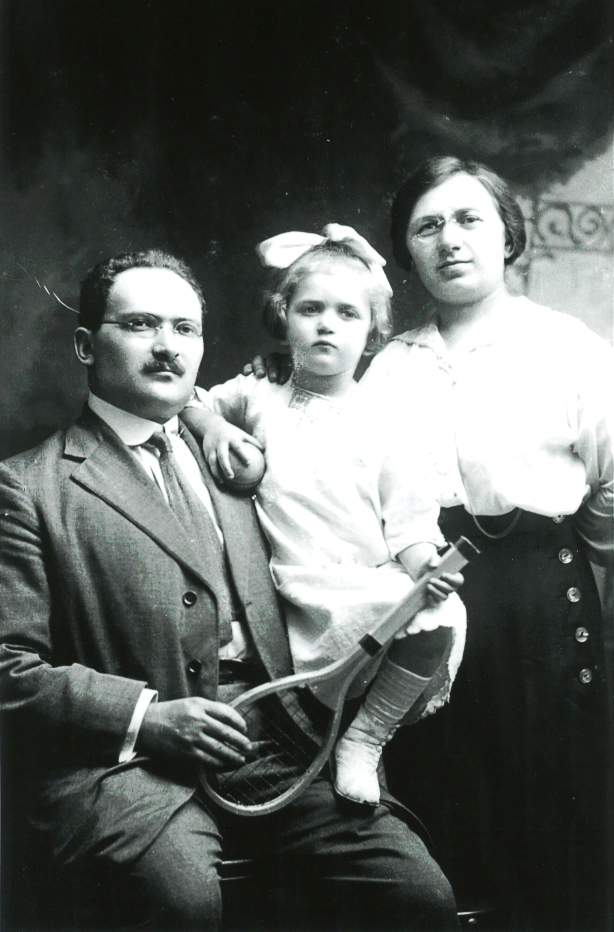 בר בורוכוב עם אשתו ליובה והבת שושנה, ניו יורק, 1916.